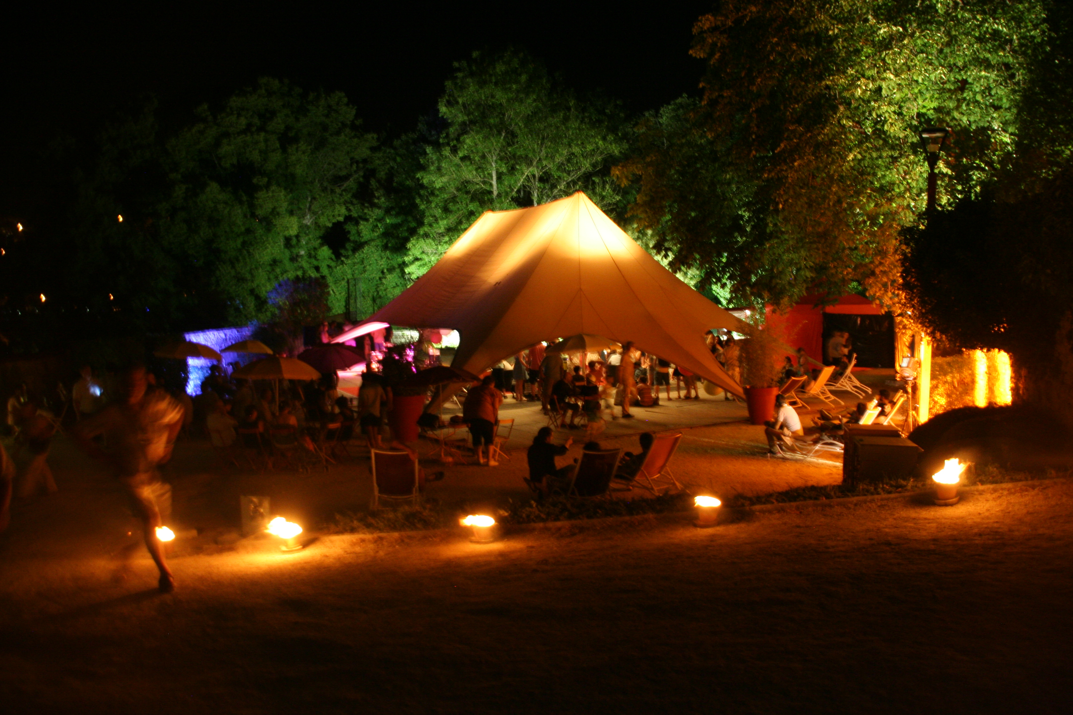 Guinguette du Festival Renaissances 2015 de Bar-le-Duc installée dans la cour Grangettes en Ville Haute.